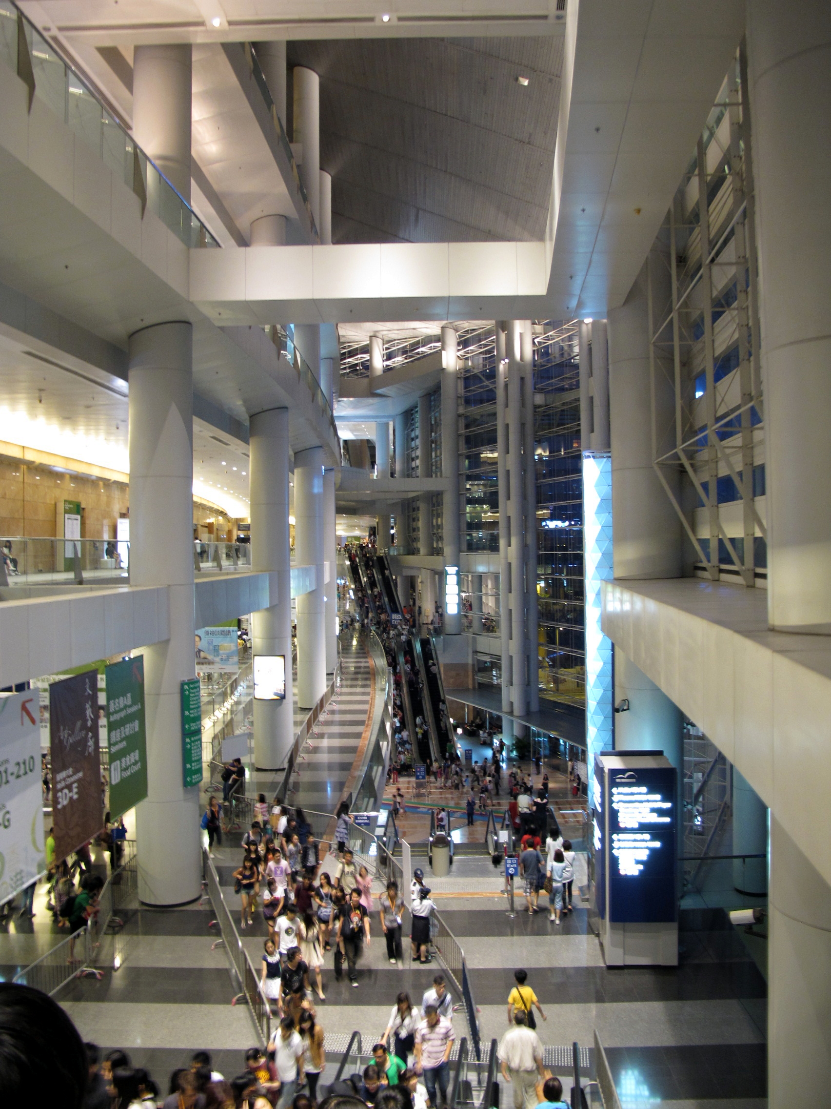 HKCEC Atrium